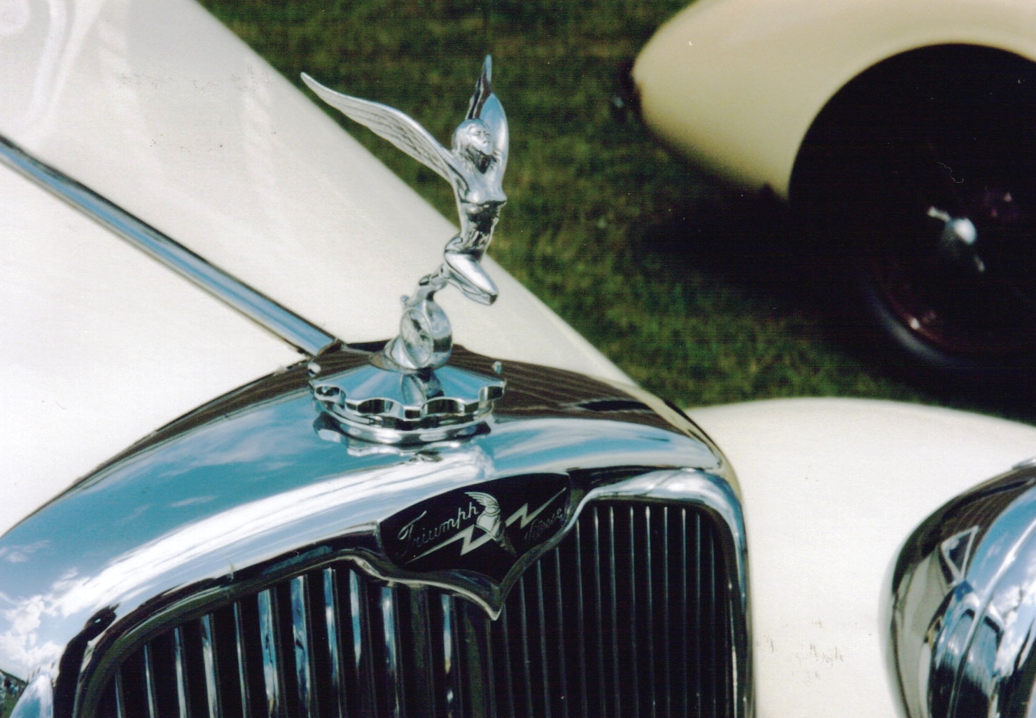 Triumph Vitesse Emblem, Figur. Foto in England